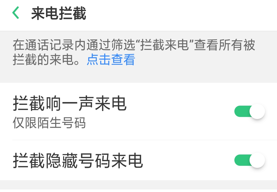 “屏蔽响一声来电”功能的截图